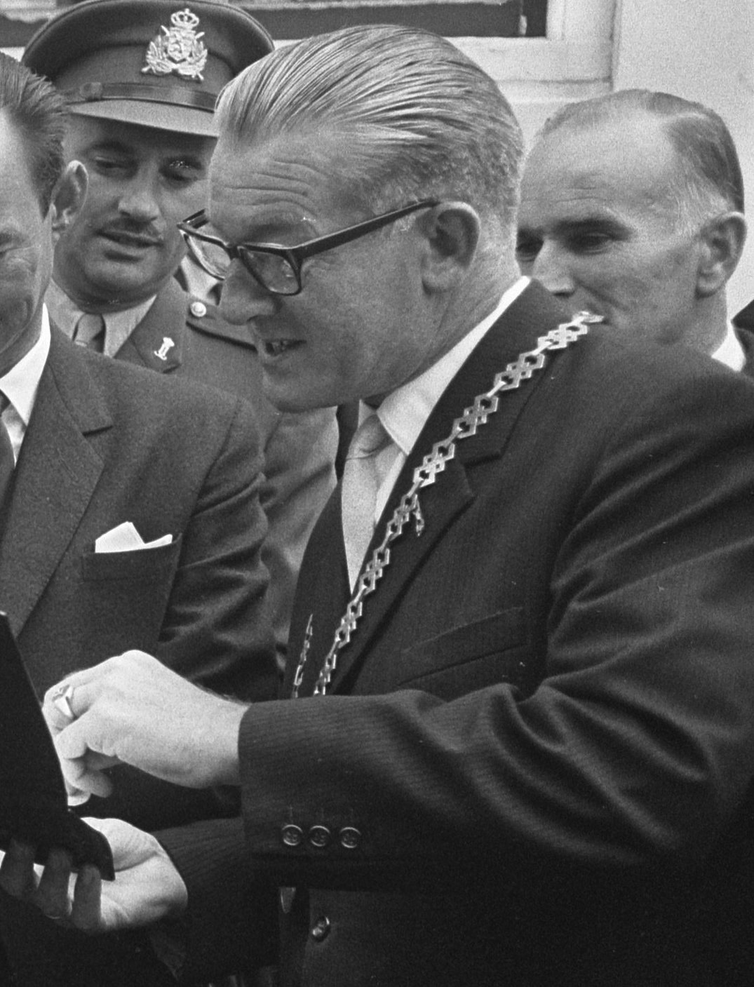 Collectie / Archief : Fotocollectie Anefo Reportage / Serie : [ onbekend ] Beschrijving : Koninklijk bezoek naar Zeeland v Datum : 14 september 1967 Locatie : Zeeland Trefwoorden : bezoeken, prinsen, prinsessen Persoonsnaam : Beatrix, prinses Fotograaf : Koch, Eric / Anefo Auteursrechthebbende : Nationaal Archief Materiaalsoort : Negatief (zwart/wit) Nummer archiefinventaris : bekijk toegang 2.24.01.05 Bestanddeelnummer : 920-7040